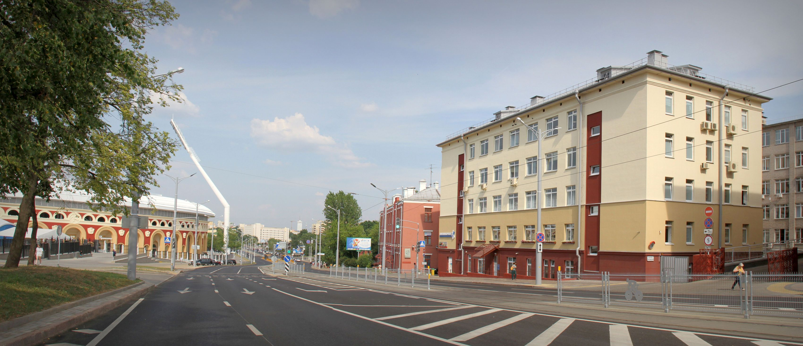 Здание Минскинжпроект после реконструкции стадиона "Динамо" и улицы Ульяновской в 2019 г.